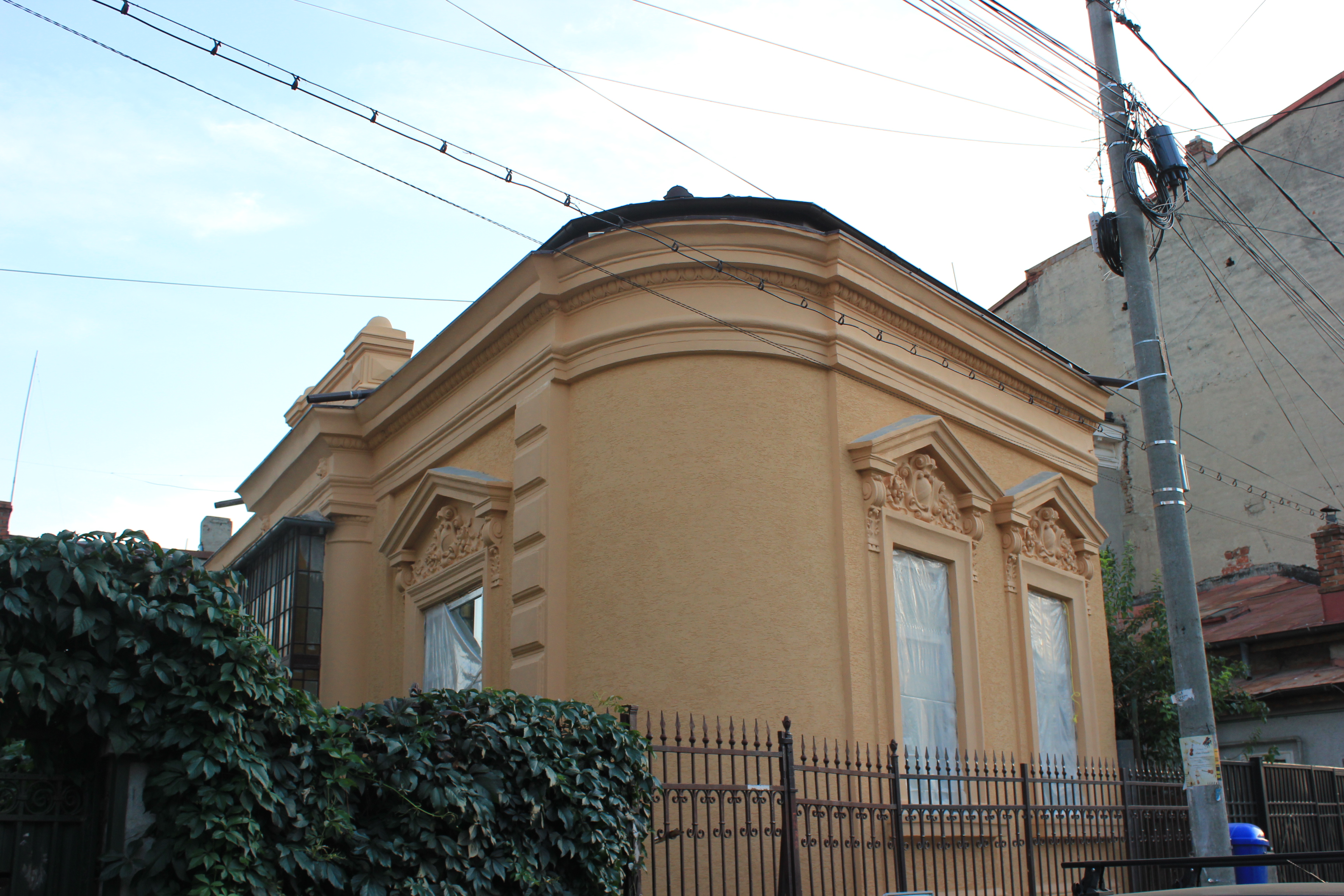 Casă Georgescu Mihail 10